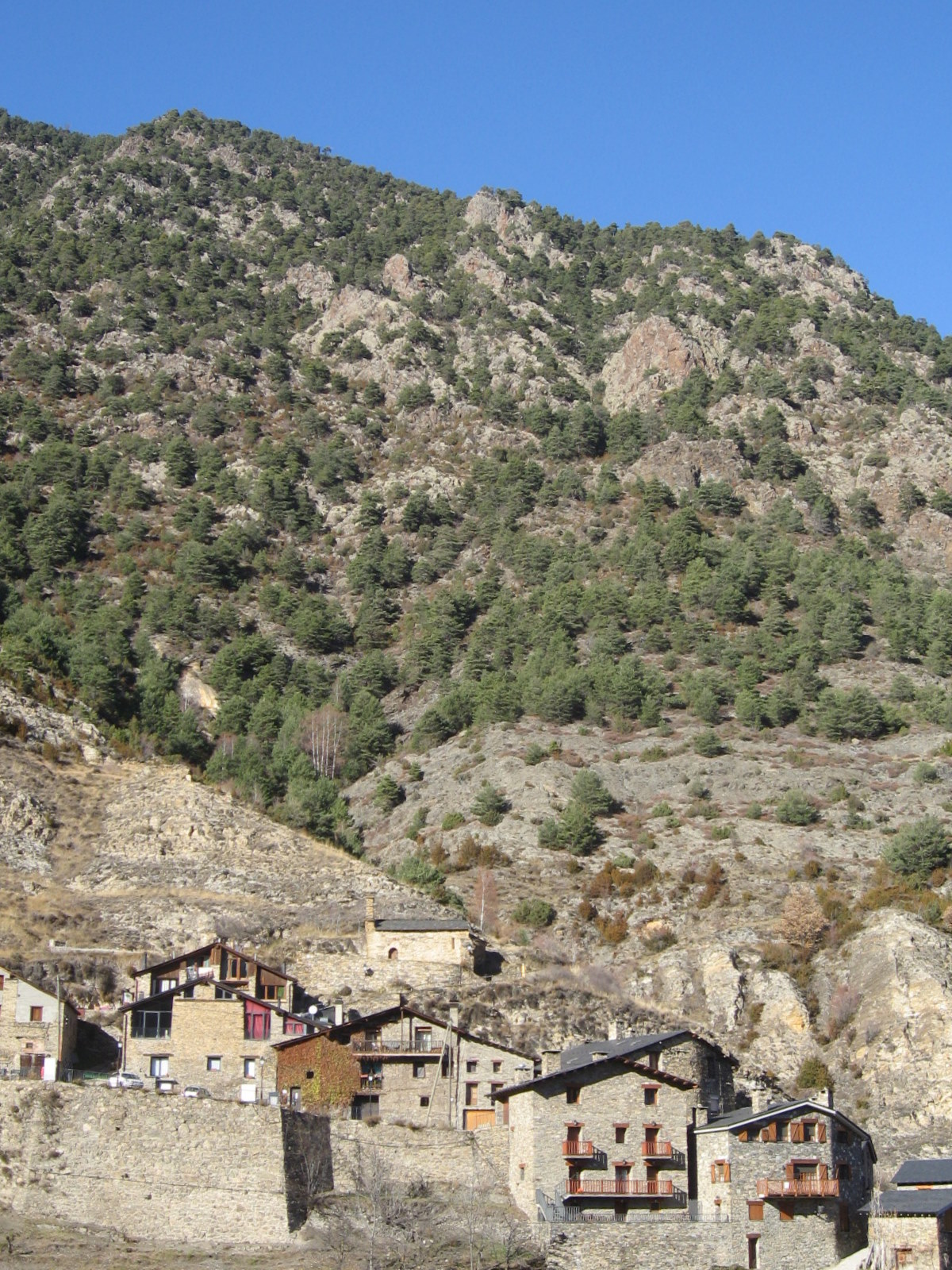 Església de Sant Miquel sobre el poble de Fontaneda